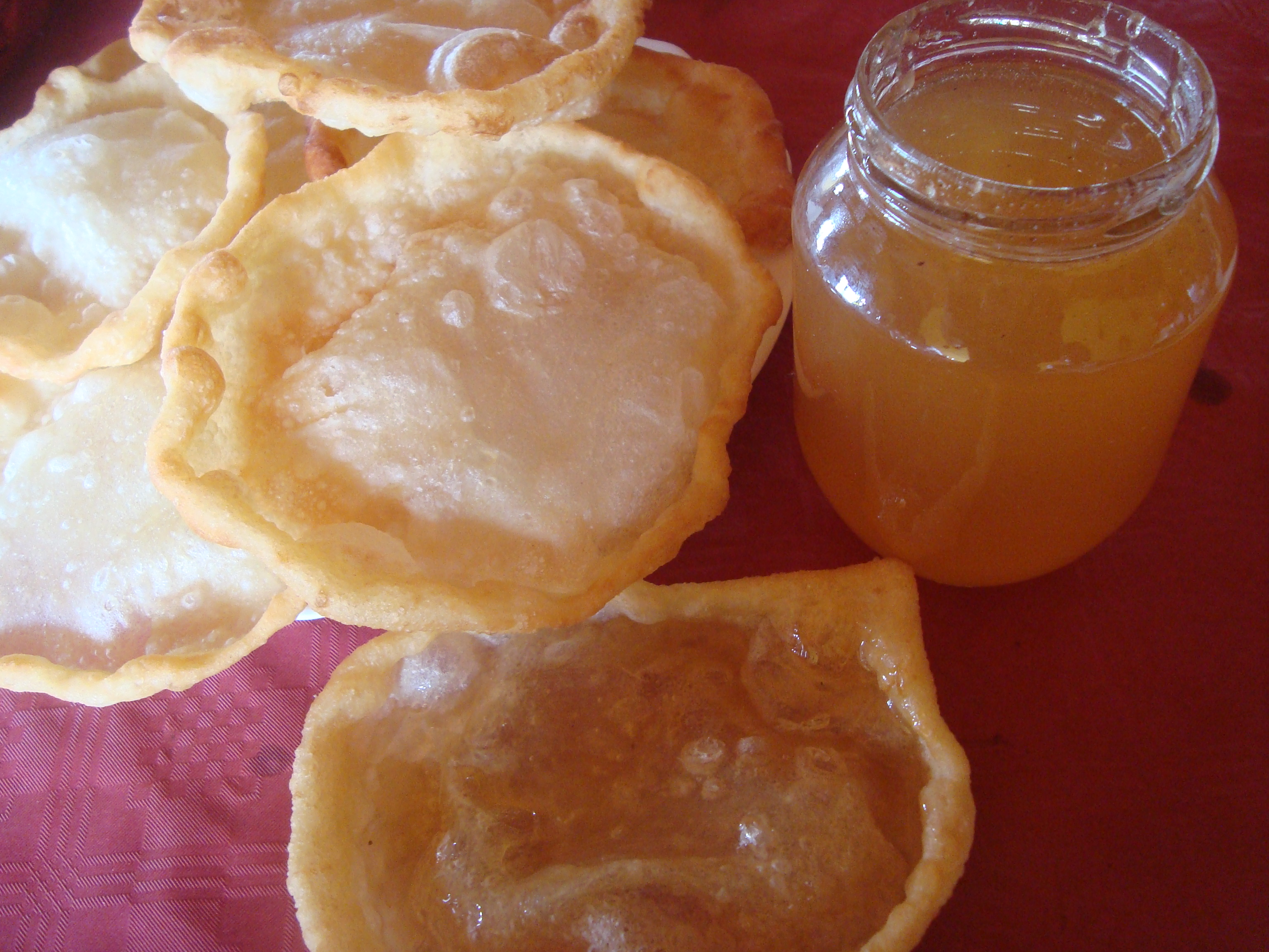 Alosetes (orejetas) con miel, gastronomía de Xert (Comunidad Valenciana)